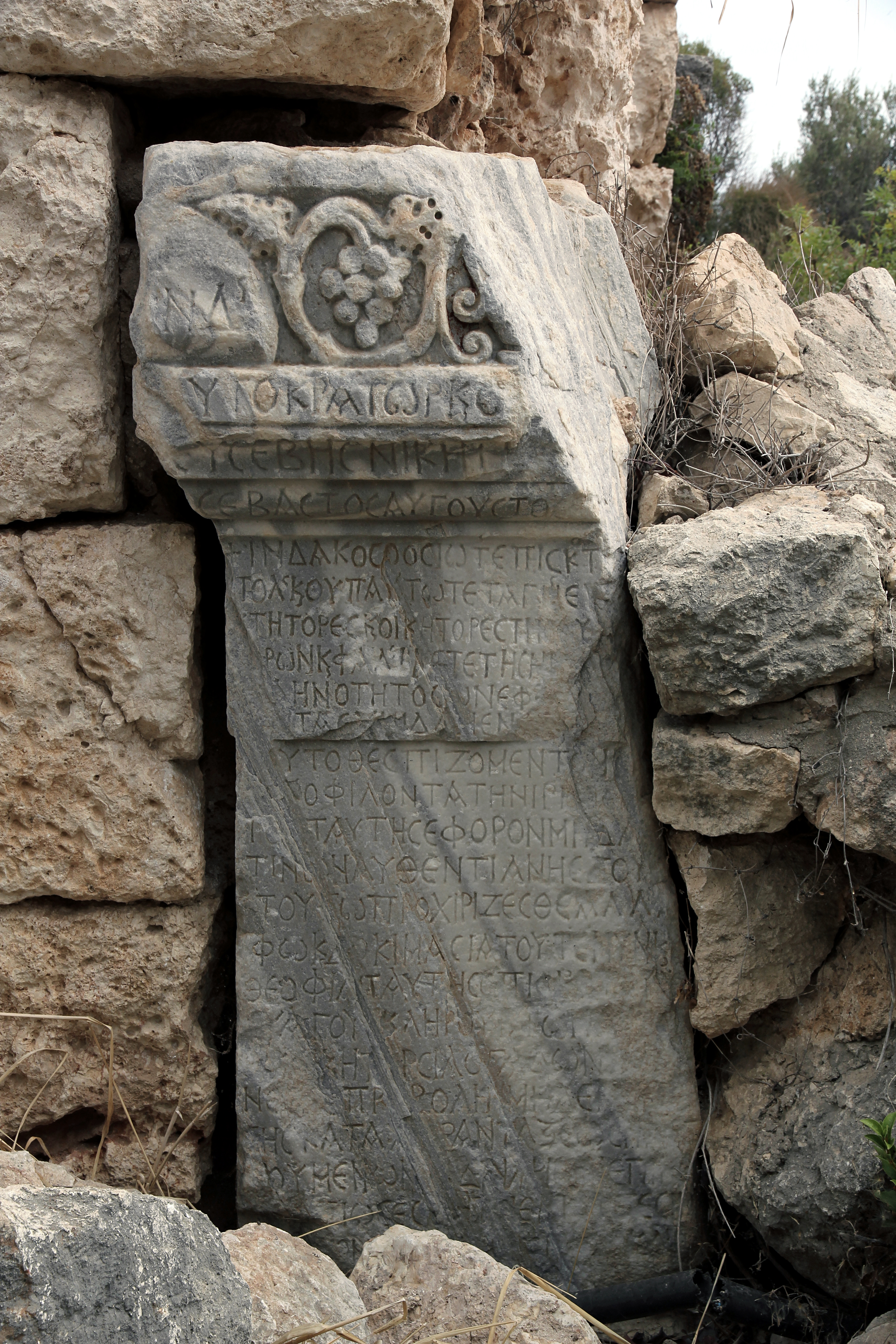 Korykos, Landburg bei Kızkalesi, Südtürkei, römischer Altarstein als Spolie im Haupteingang der Burg. Er trägt in Zweitverwendung eine Inschrift mit einem kaiserlichen Erlass.